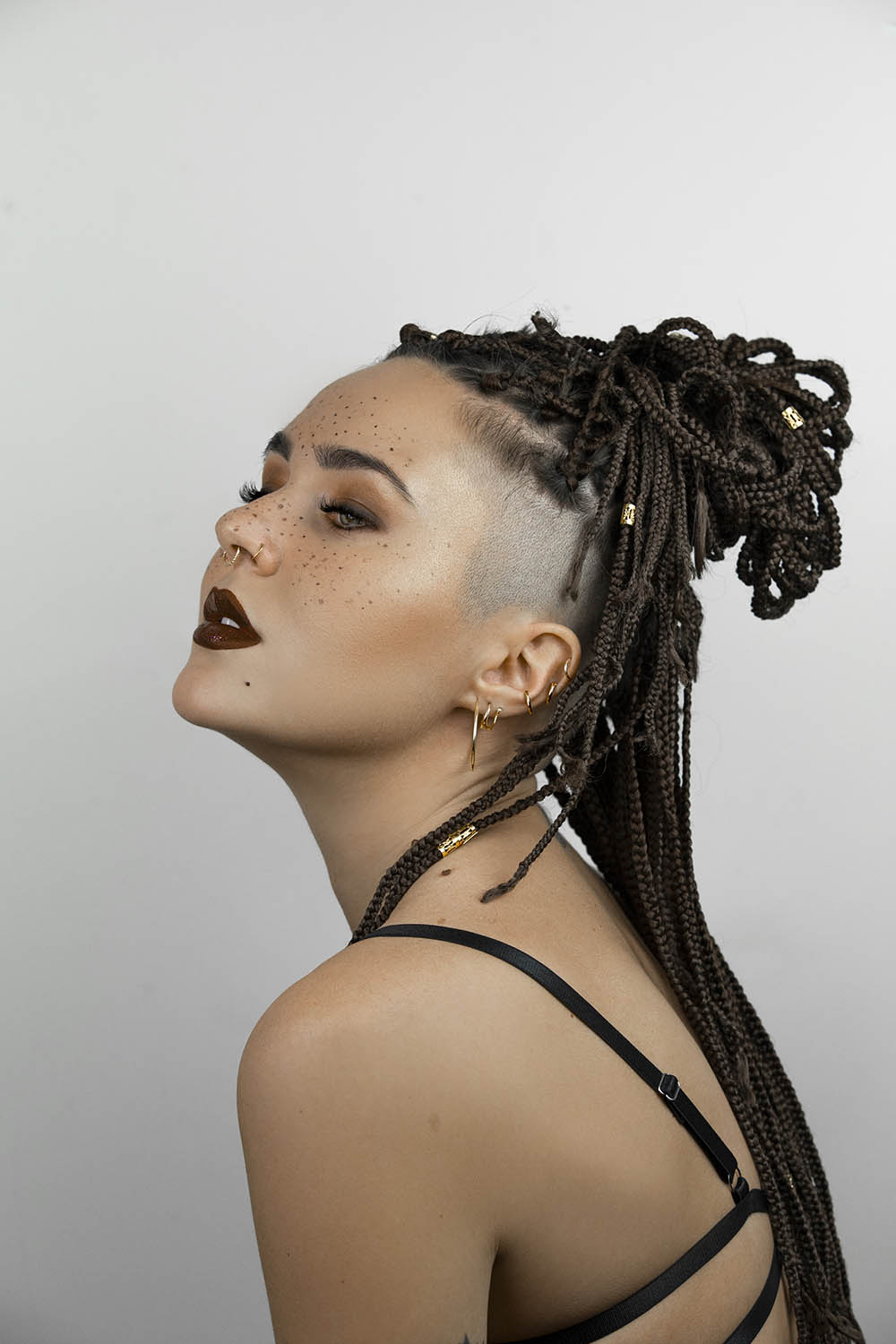 La réalisatrice et productrice Sandra Kobanovitch en novembre 2019.